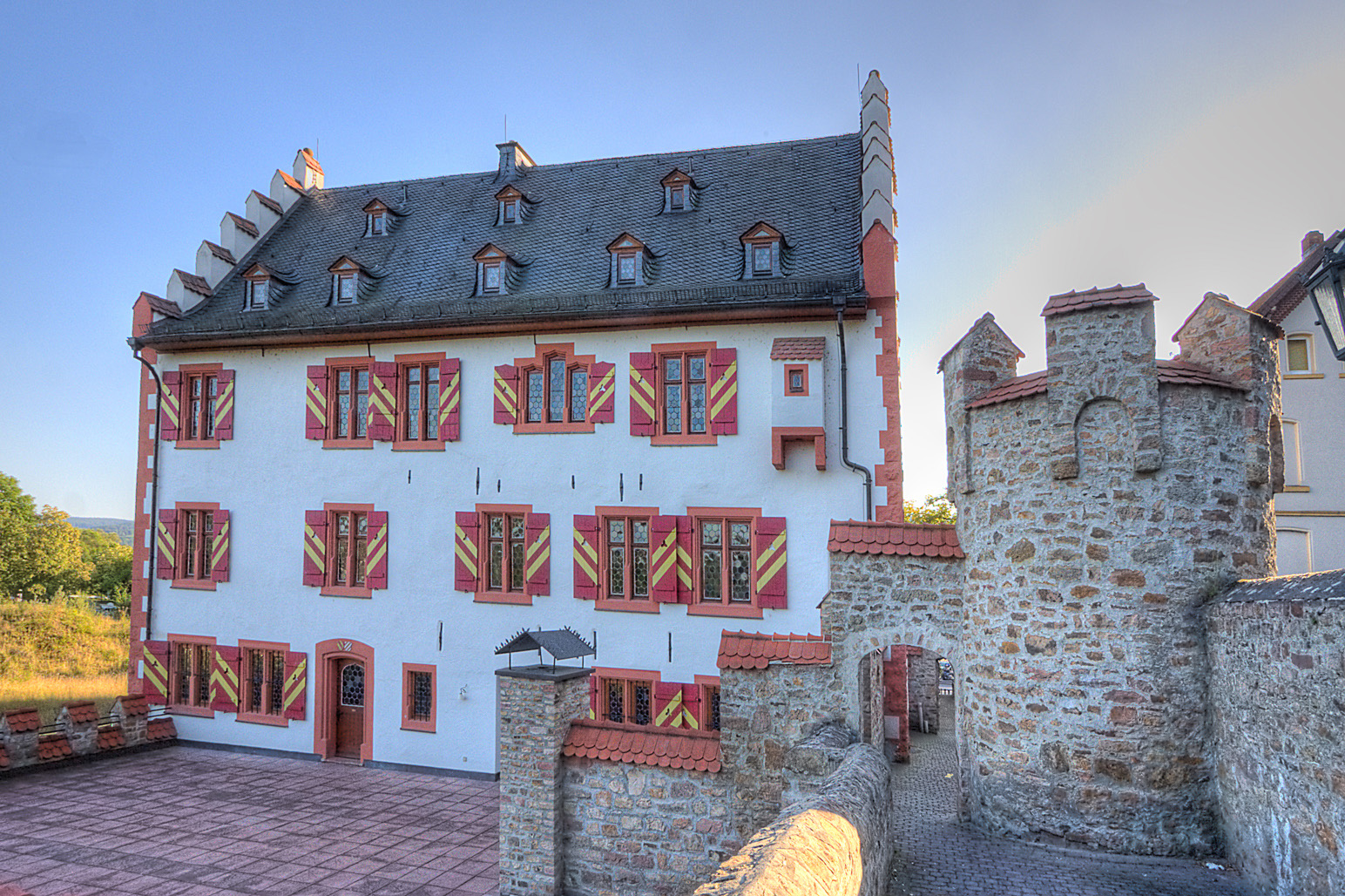 Huttenschloss (Hutten'sche Talburg) in Bad Soden in Deutschland. Erbaut 1536 von Lukas von Hutten und Ehefrau Appolonia von Frankenstein.